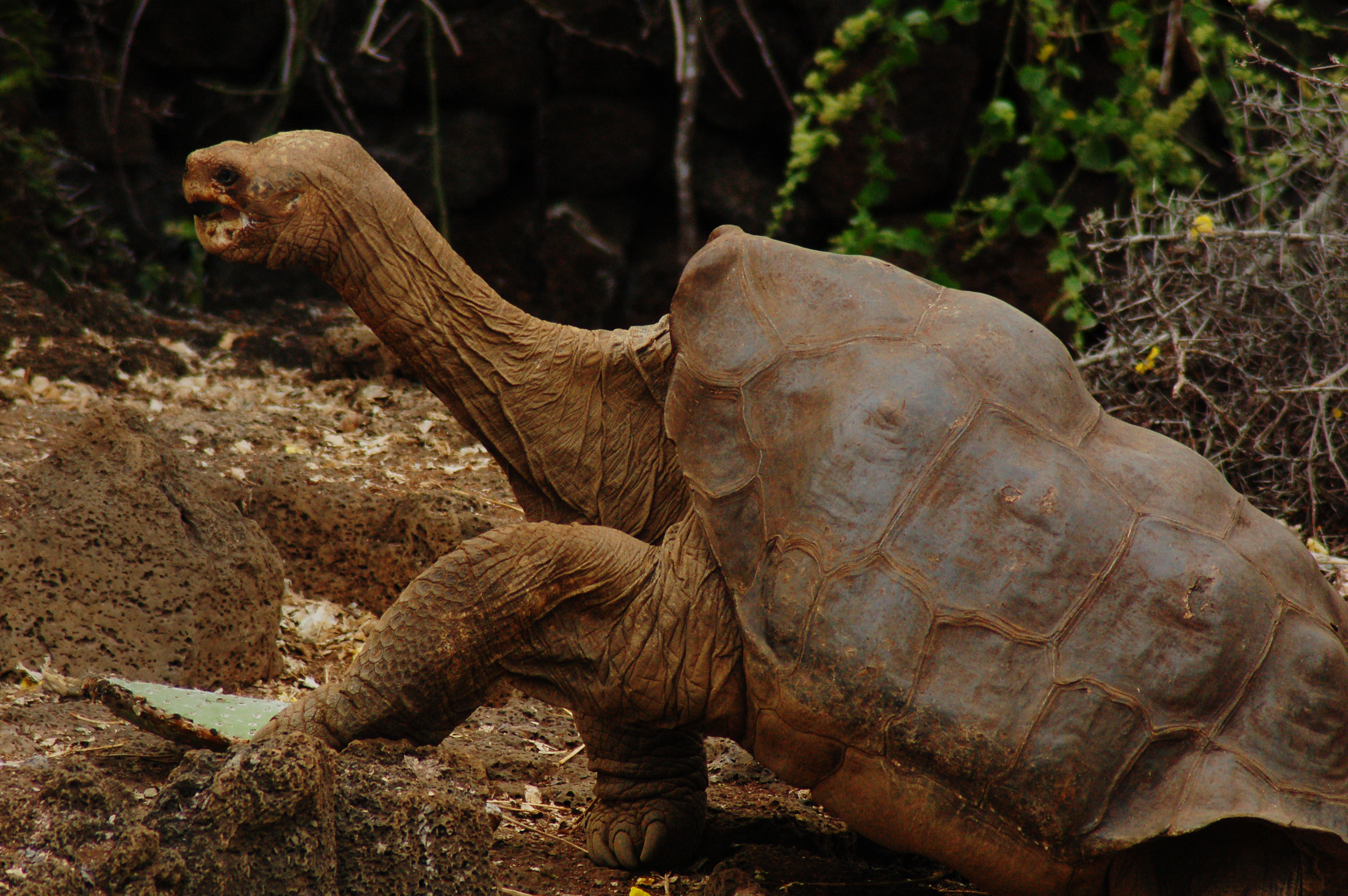 Lonesome George